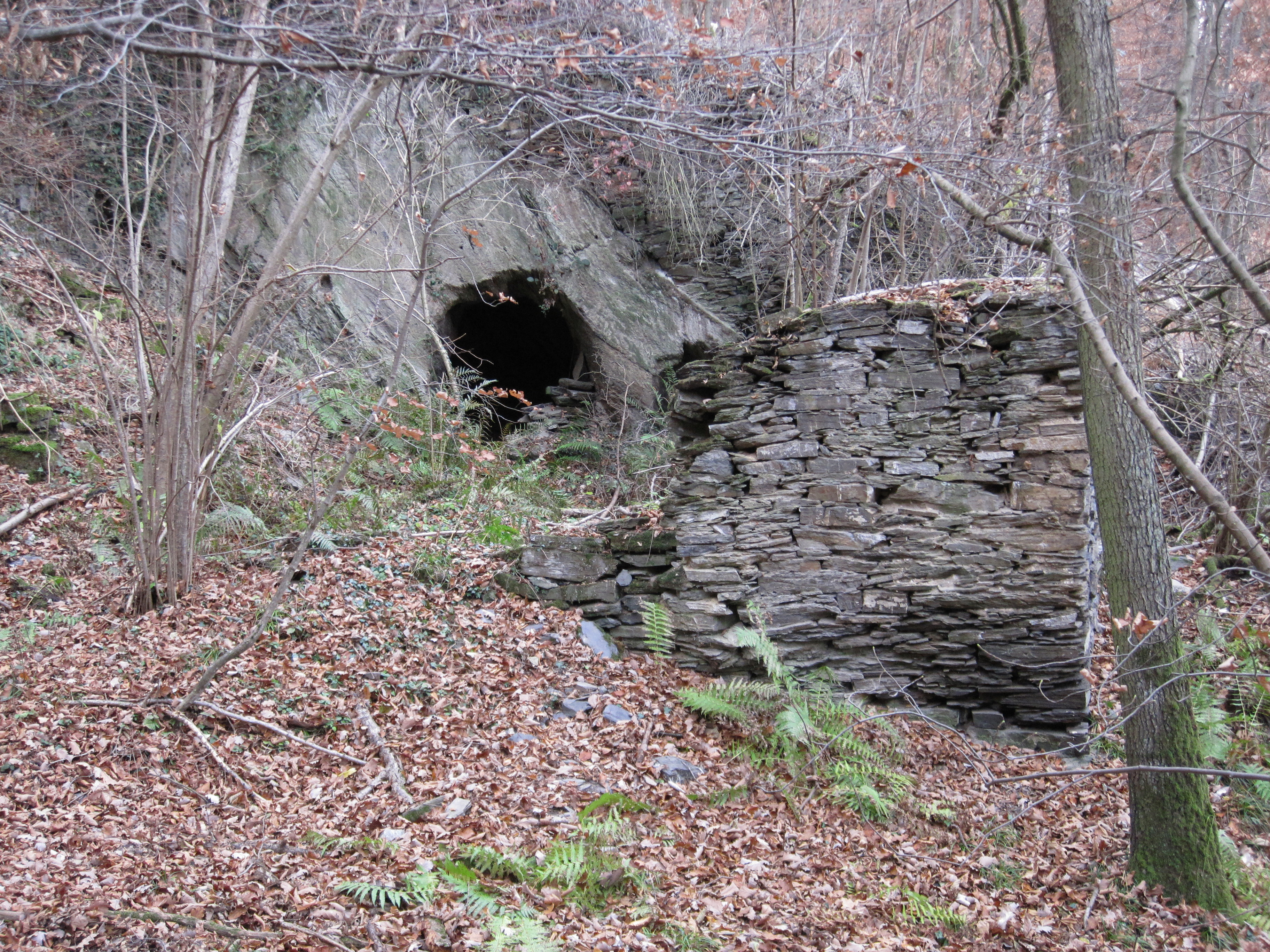 Grube Gute Hoffnung: Mundloch des Äquivalenzstollens mit Überresten eines Grubengebäudes bei St.Goarshausen-Wellmich.